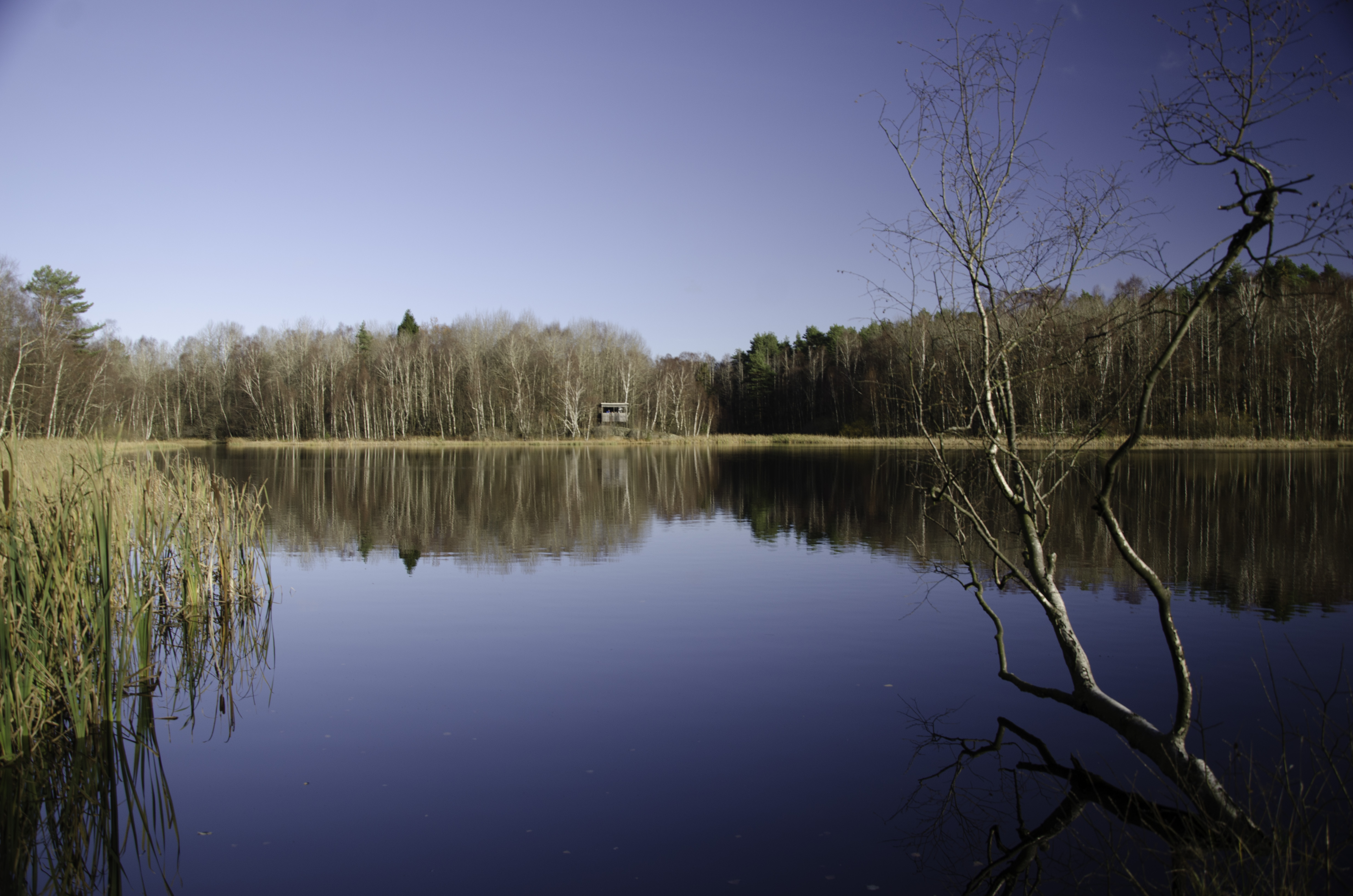 Svarttjärn, Göteborg, Sweden